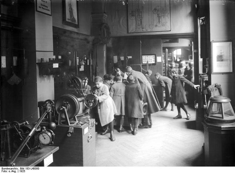 ADN-ZB/Archiv Berlin 1925 Schüler besichtigen das Museum für Meereskunde in der Georgenstraße 1017-25 [Scherl Bilderdienst]